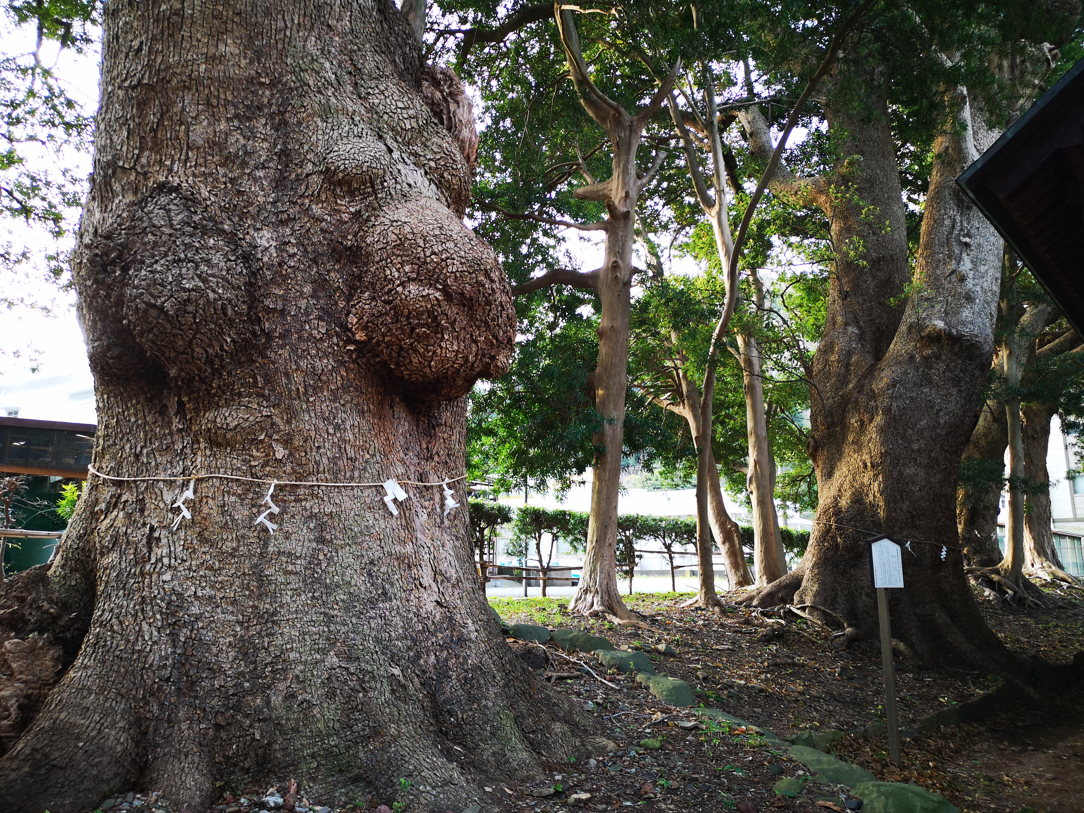 静岡県沼津市戸田にある部田神社のこぶ付き大クス（沼津市指定天然記念物）